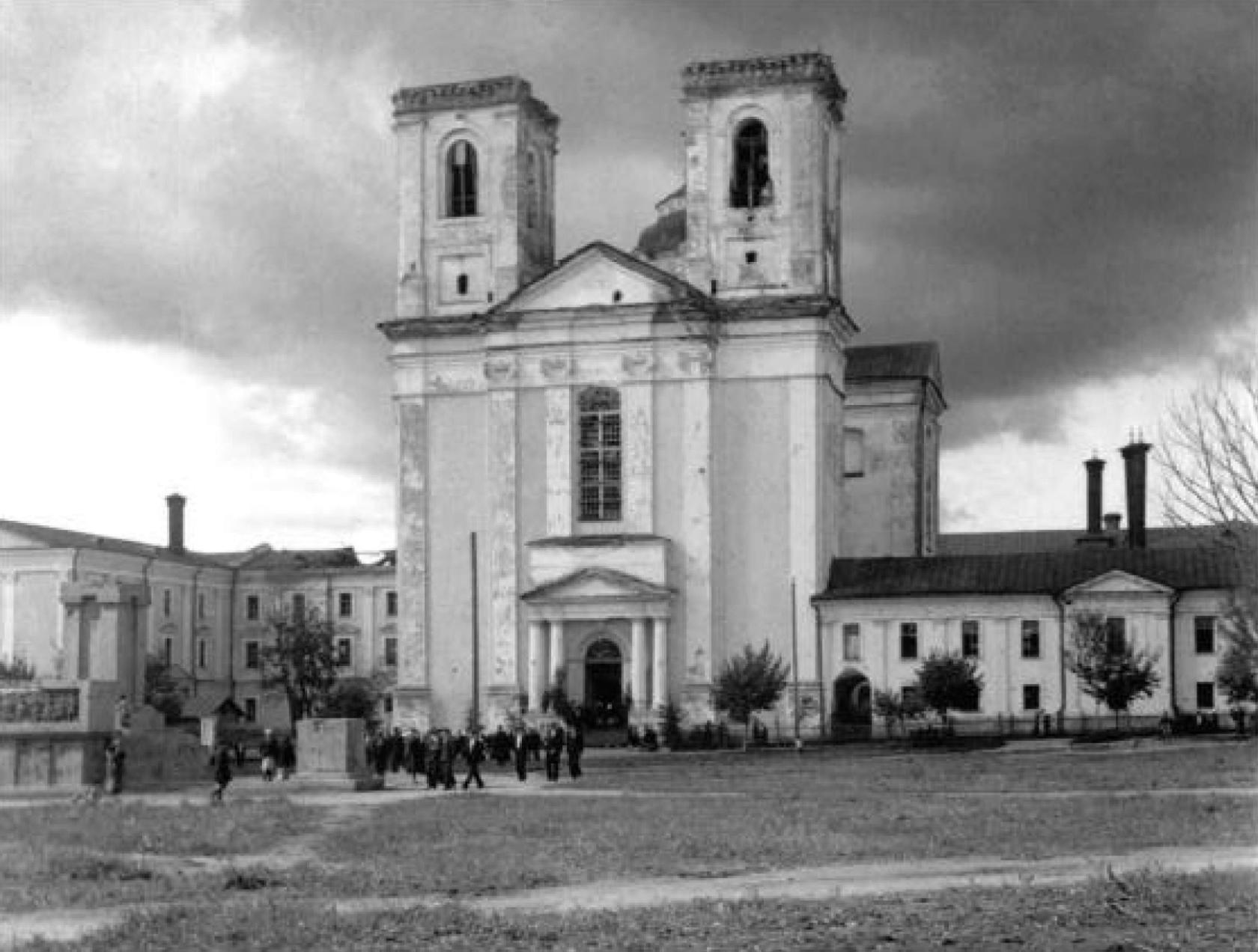 Беларуская (тарашкевіца): Полацак (Połacak), пляц Рынак (plac Rynak). Касьцёл Сьвятога Стэфана і калегіюм езуітаў